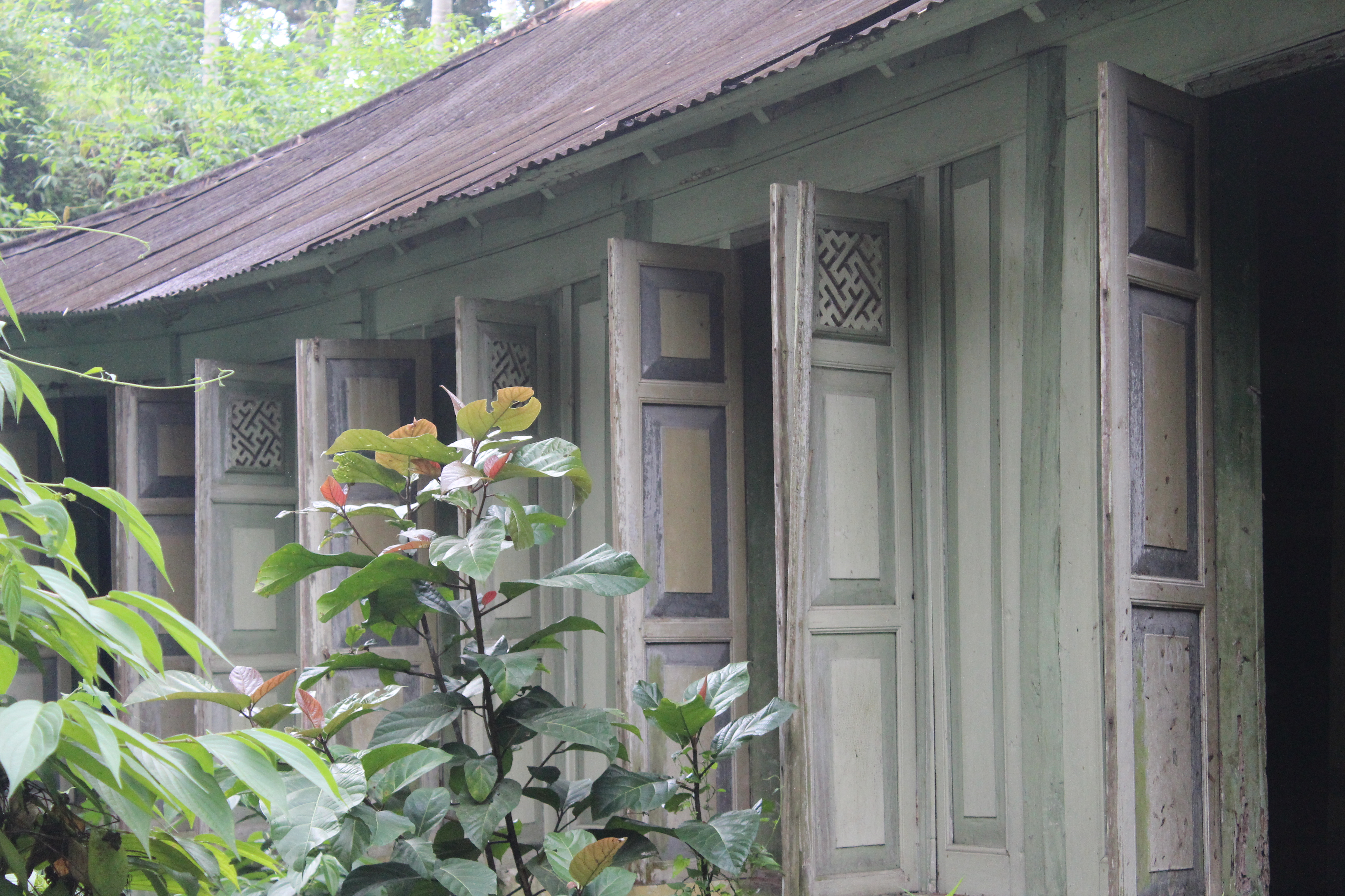 Masjid Ampang Gadang di Desa Ampang Gadang, Kecamatan Guguk, Kabupaten Lima Puluh Kota, Sumatra Barat, Indonesia.